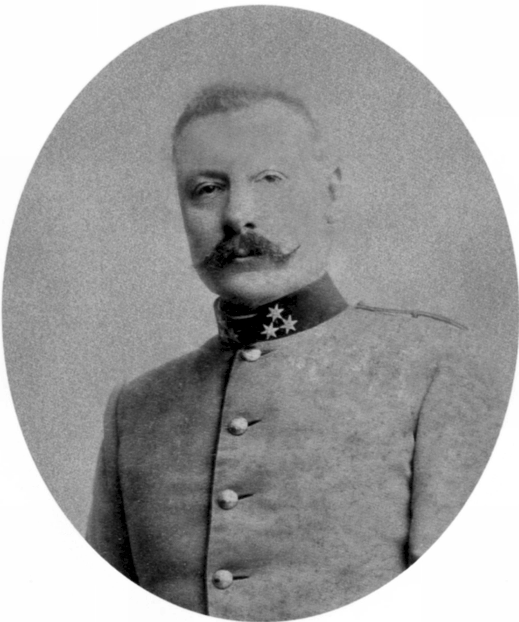 Anatol Graf Bigot de St. Quentin als Hauptmann, später FML